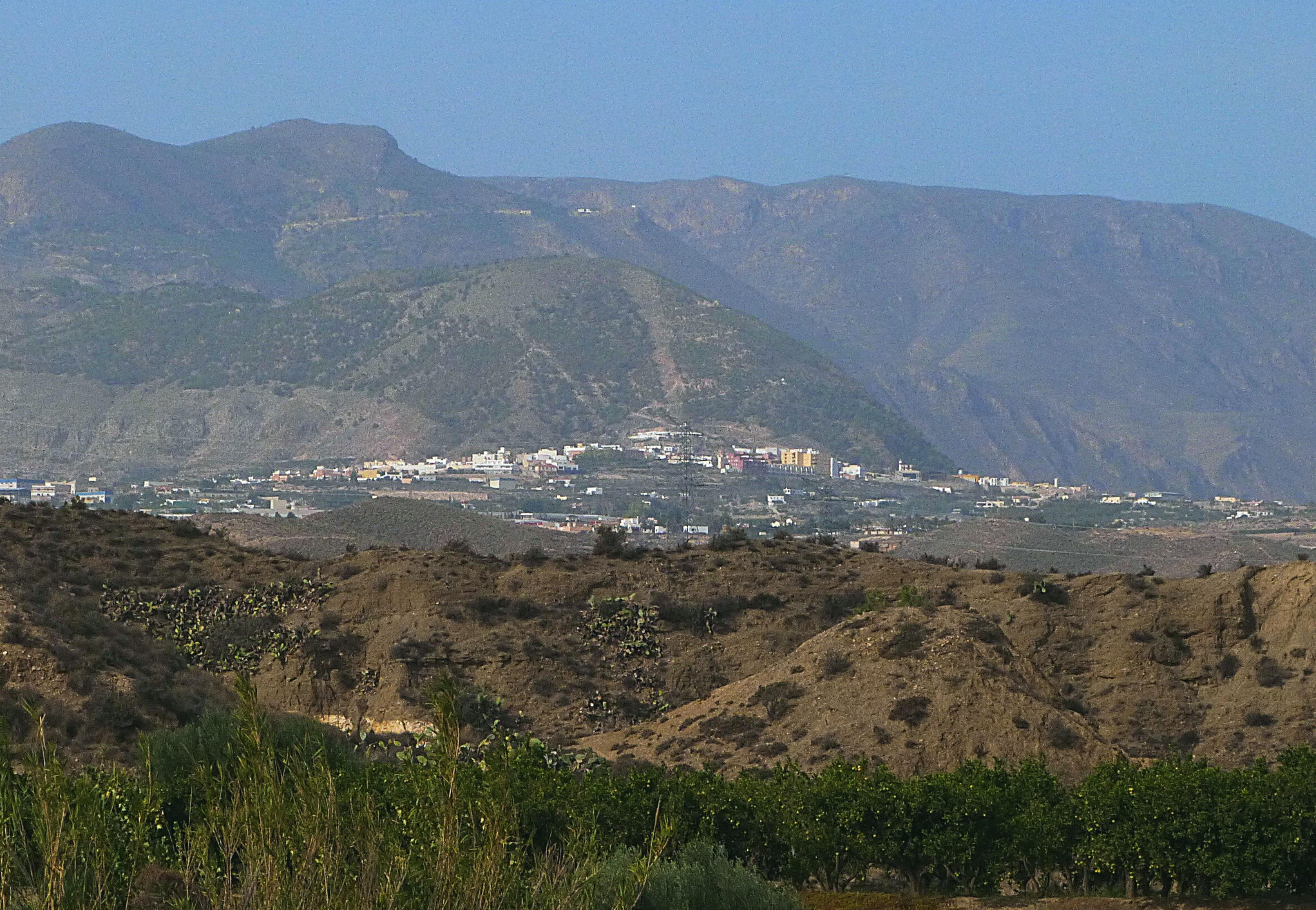 Alhama de Almería, Blick von Gádor